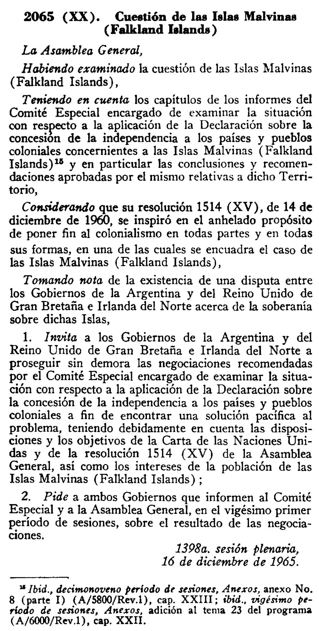 La resolución 2065 de la Asamblea General de la ONU, aprobada el 16 de diciembre de 1965, reconoció la existencia de una disputa de soberanía entre el Reino Unido y la Argentina en torno a las Islas Malvinas. De igual manera, reconoció que el caso de las Malvinas se encuadra en una situación colonial, que debe ser resuelta teniendo en consideración lo expresado en la resolución 1514 (XV), donde se estableció el objetivo de eliminar toda forma de colonialismo. La resolución invita a las partes a resolver sin demora la disputa de soberanía teniendo en cuenta los intereses de los habitantes de las islas.